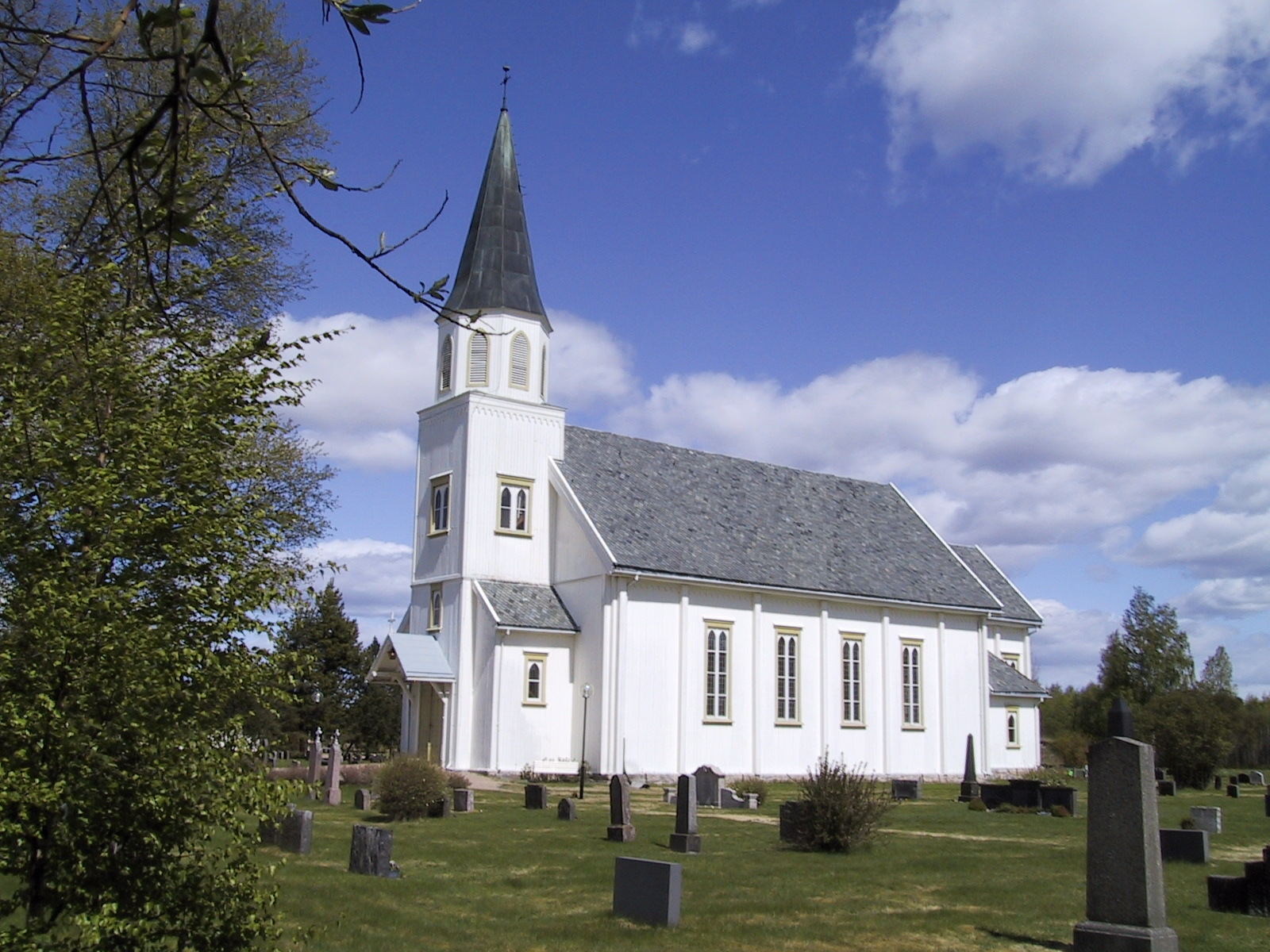 Arneberg kirke i Åsnes